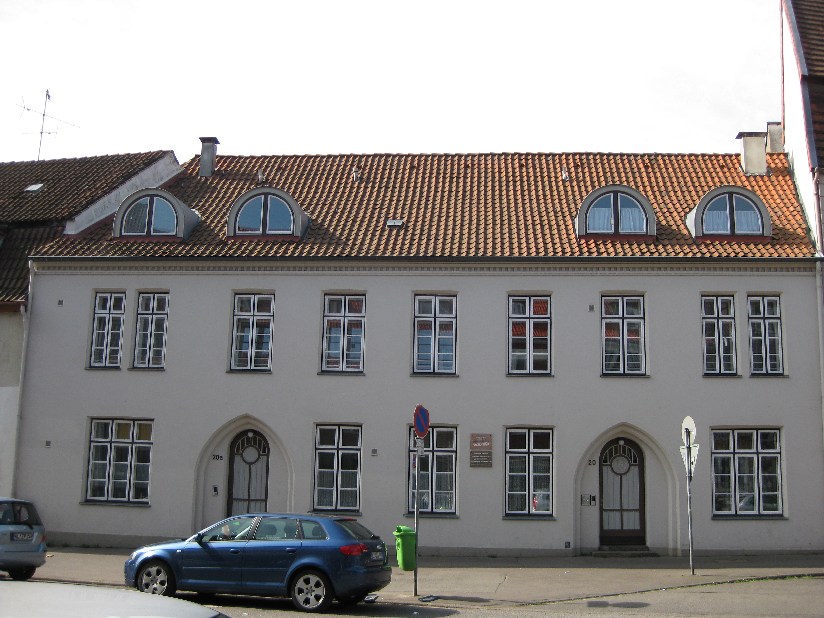 Zerrenthiens Armenhaus in der Krähenstraße 20 in Lübeck ist eine Stiftung des Kaufmanns Heinrich (Hinrich) Zerrenthien (Tzerntien) aus dem Jahr 1437.